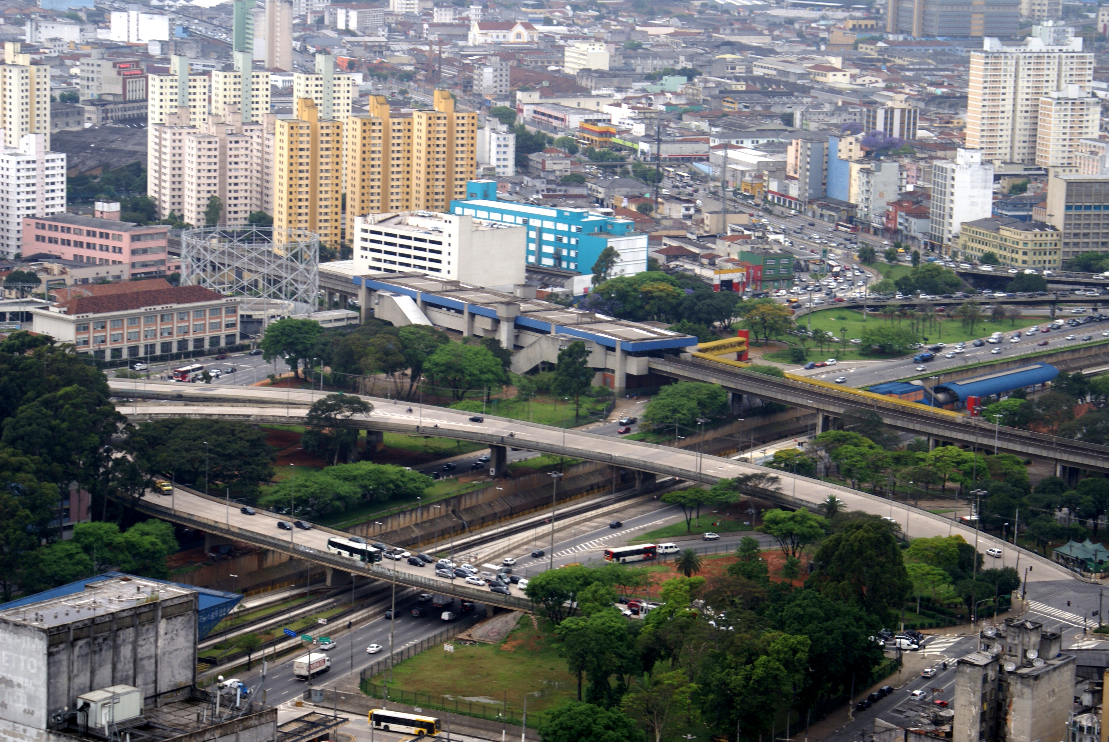 Estação e Parque Dom Pedro II, no Centro Antigo de São Paulo, Brasil - Station and Dom Pedro II Park, in Old Downtown of São Paulo City, Brazil.